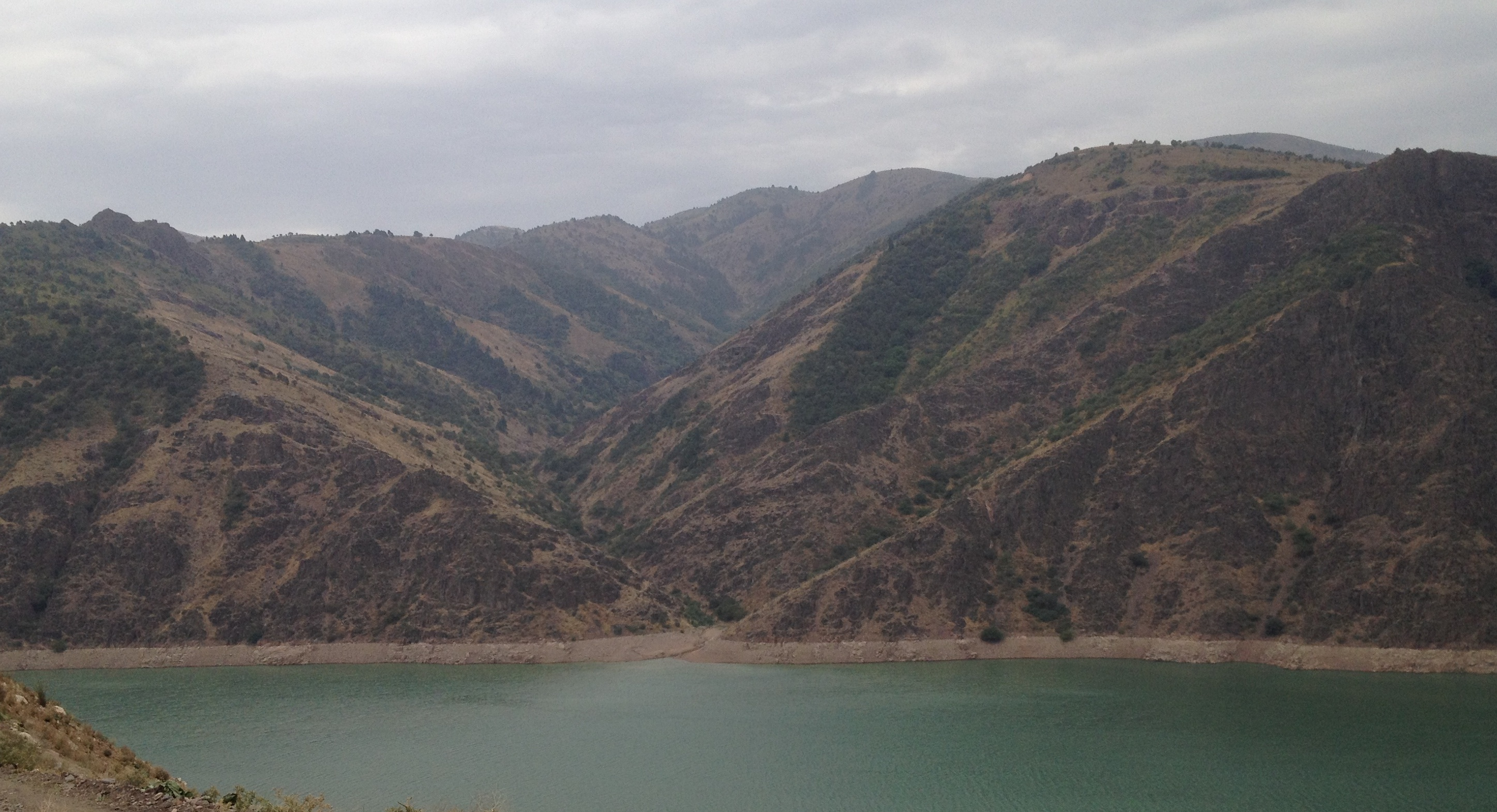 Qurama mountains near Achangaran reservoir (Angren river).